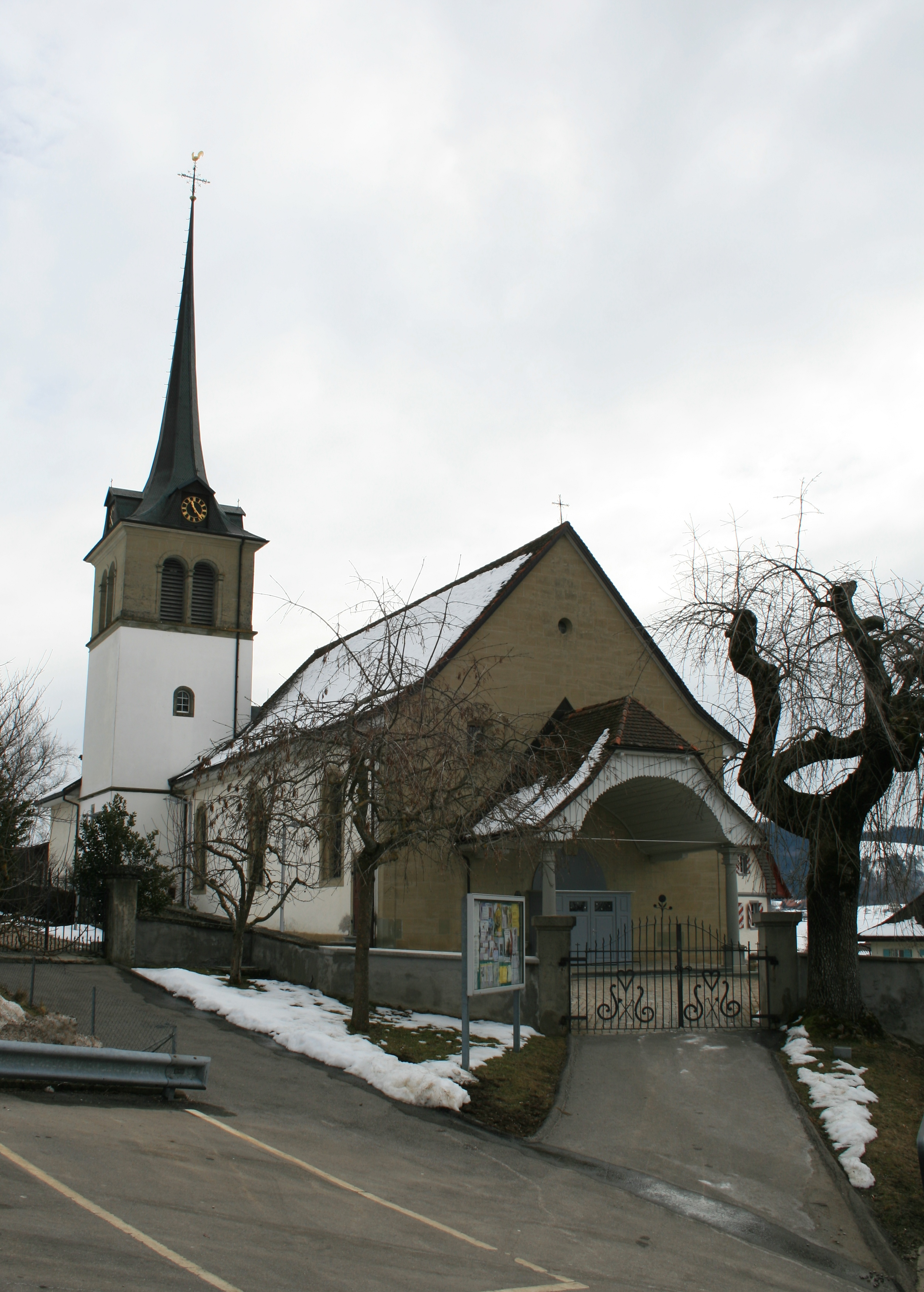 Kath. Kirche Rechthalten